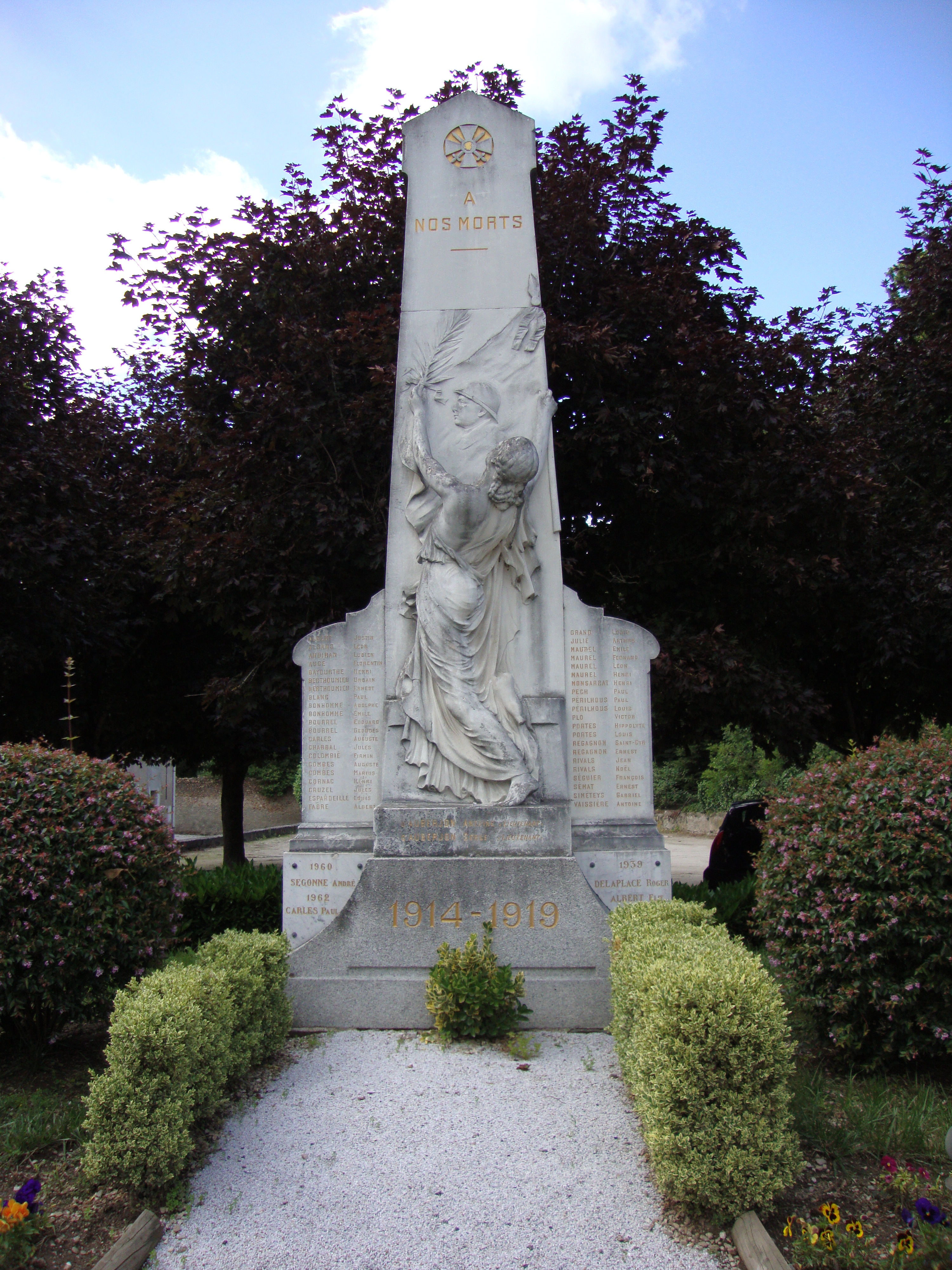 Verdalle (Tarn, Fr) Monument aux morts